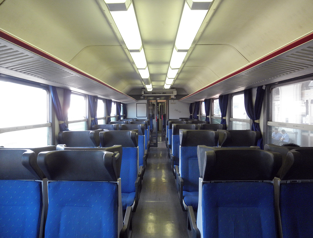 Interno di un'elettromotrice ALe 582 di Trenitalia.